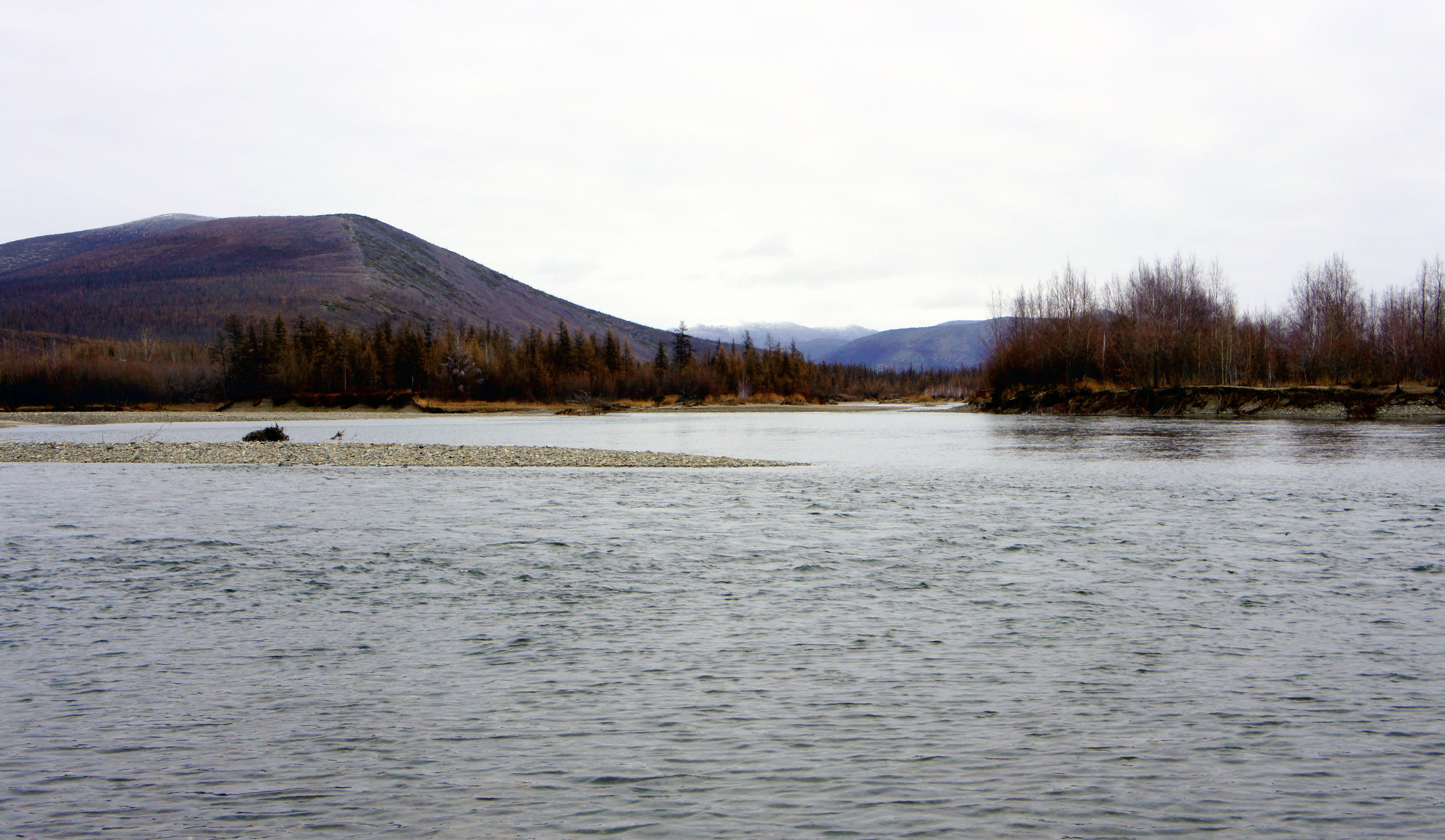 Малый Анюй